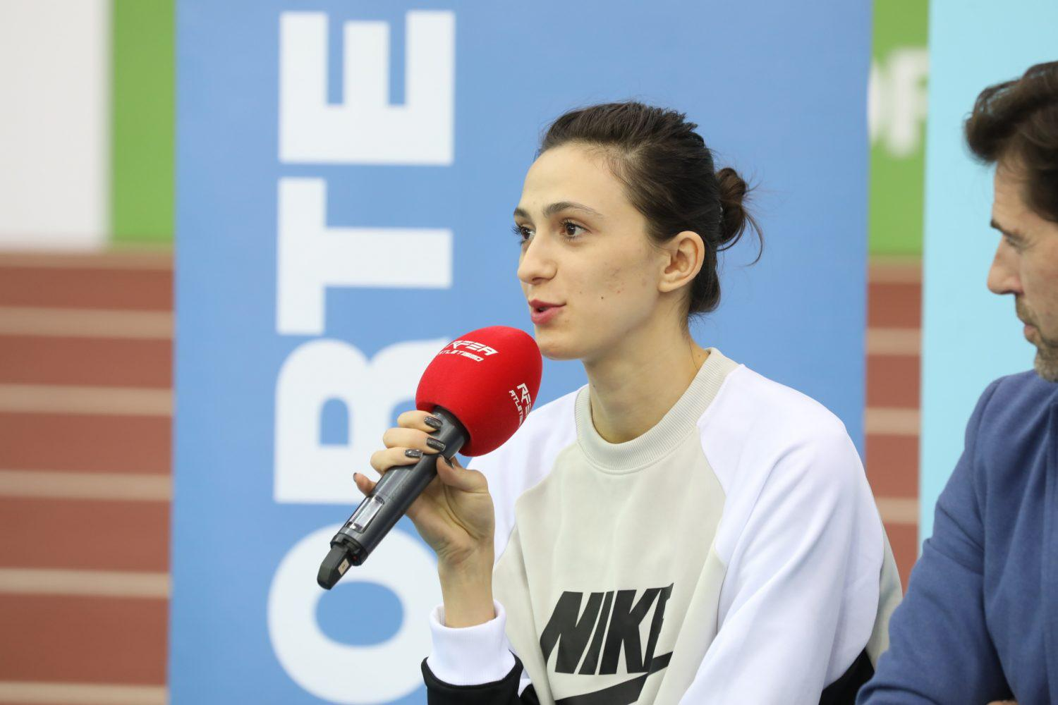 No podía existir mejor espacio para presentar la que ya es una de las grandes citas mundiales del atletismo, que la misma pista en la que se desarrollará la competición. Carlos Sánchez Mato, concejal de Latina, junto a Javier Odriozola, Director General de Deportes del Ayuntamiento de Madrid, y Raúl Chapado, Presidente de la Real Federación Española de Atletismo, han presentado esta tarde la Reunión Internacional Villa de Madrid, una de las seis citas del prestigioso circuito IAAF World Indoor Tour, y por ello, convocando al mejor atletismo del mundo en Madrid.